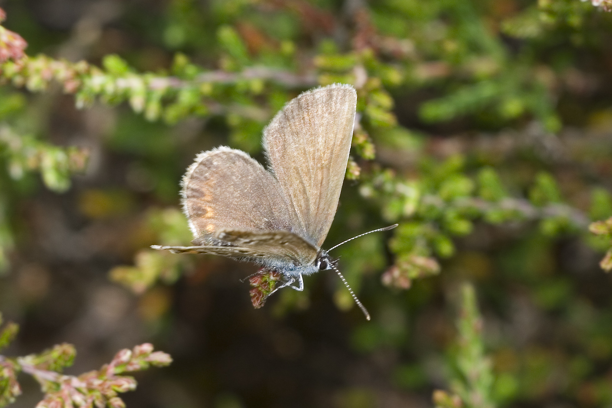 Plebeius argus